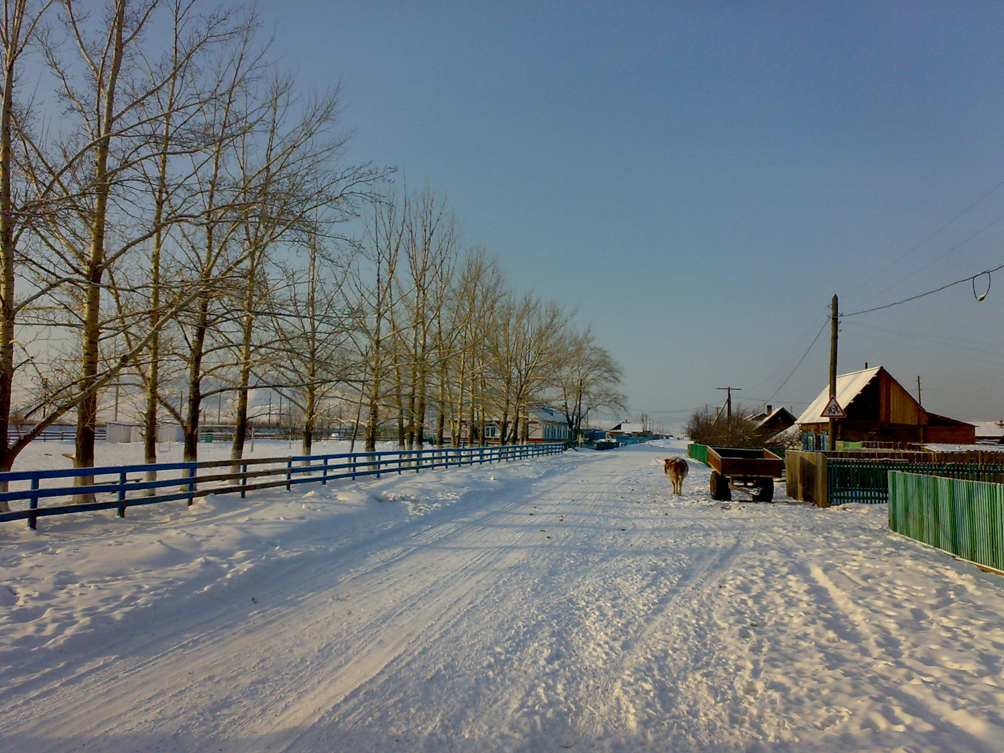 вид улицы села Верх-Аскиз